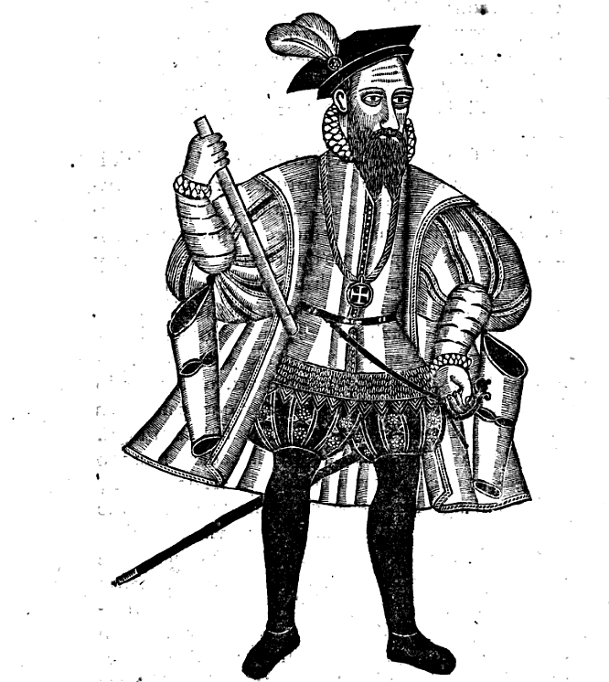 Francisco Coutinho vice-roi de l'Inde Portugaise